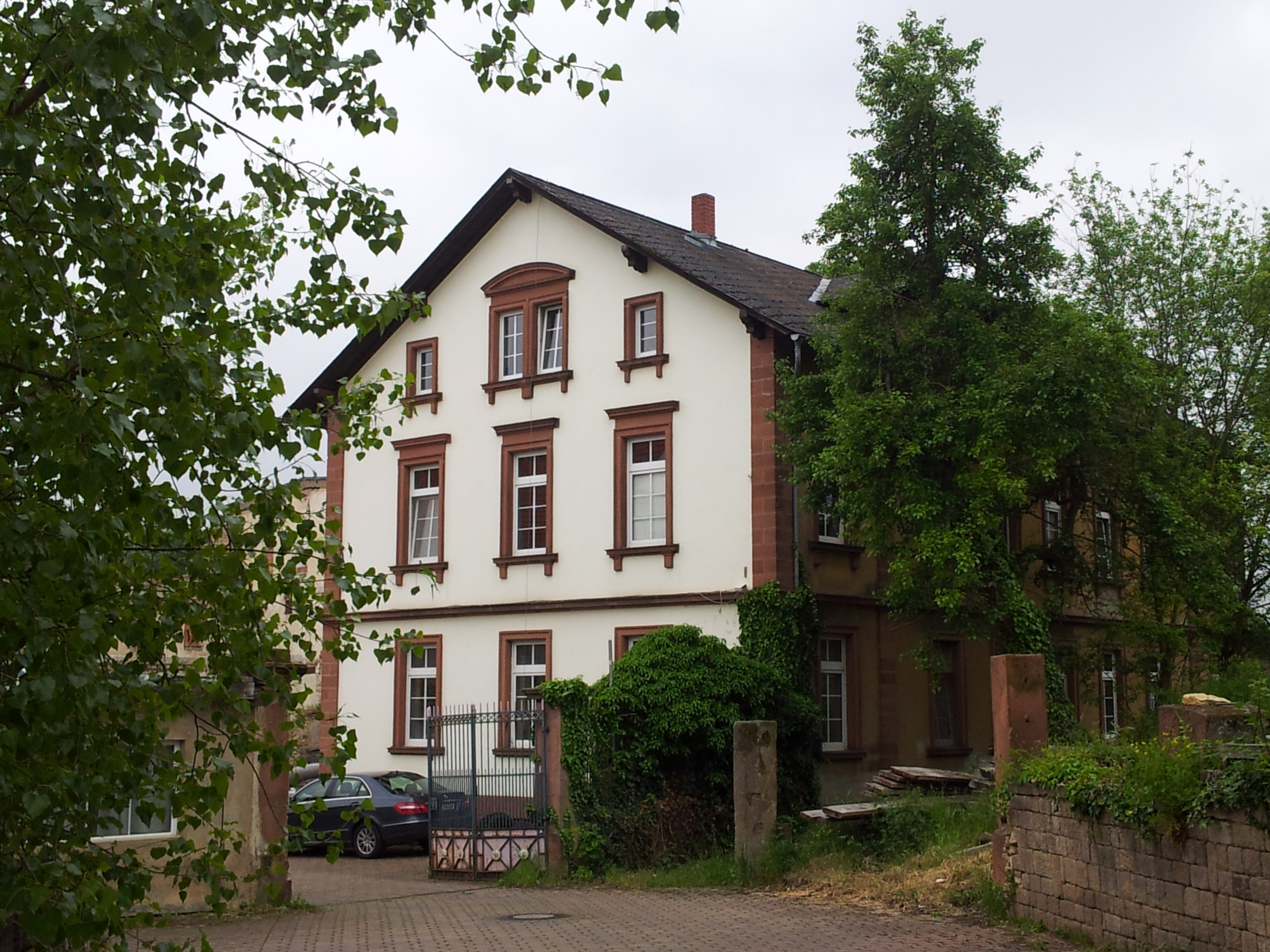 Herrenmuehle - Ansicht Herrenhaus